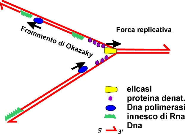 Immagine di Danilo Giacomelli